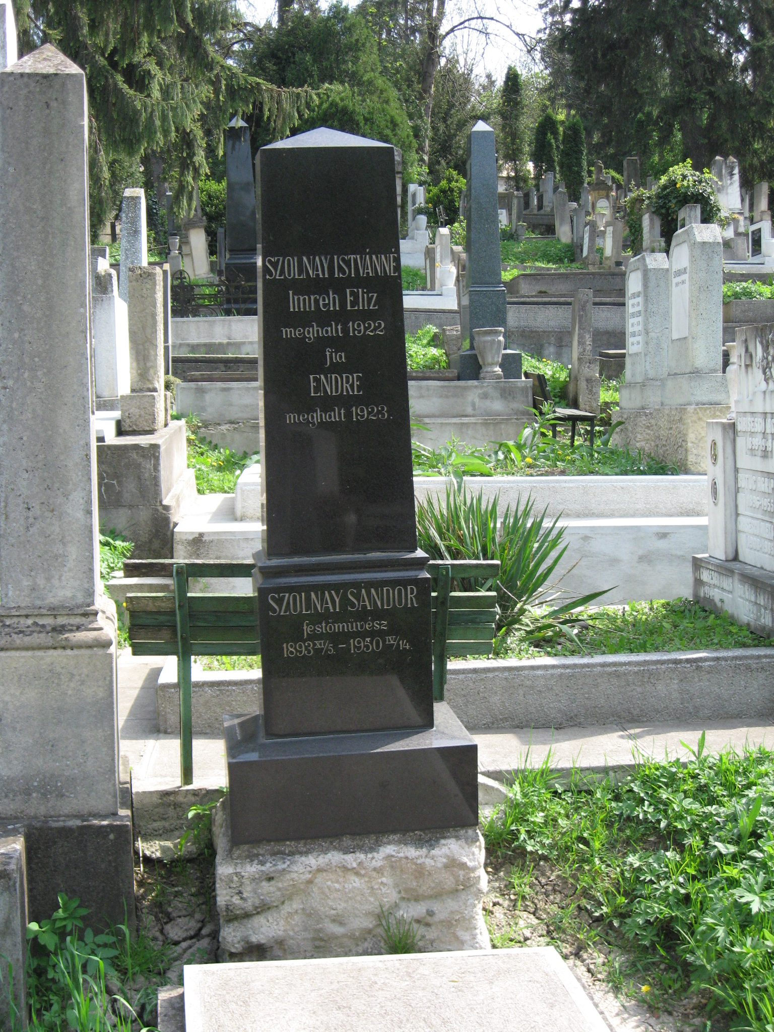 Házsongárdi temető: Szolnay Sándor sírja